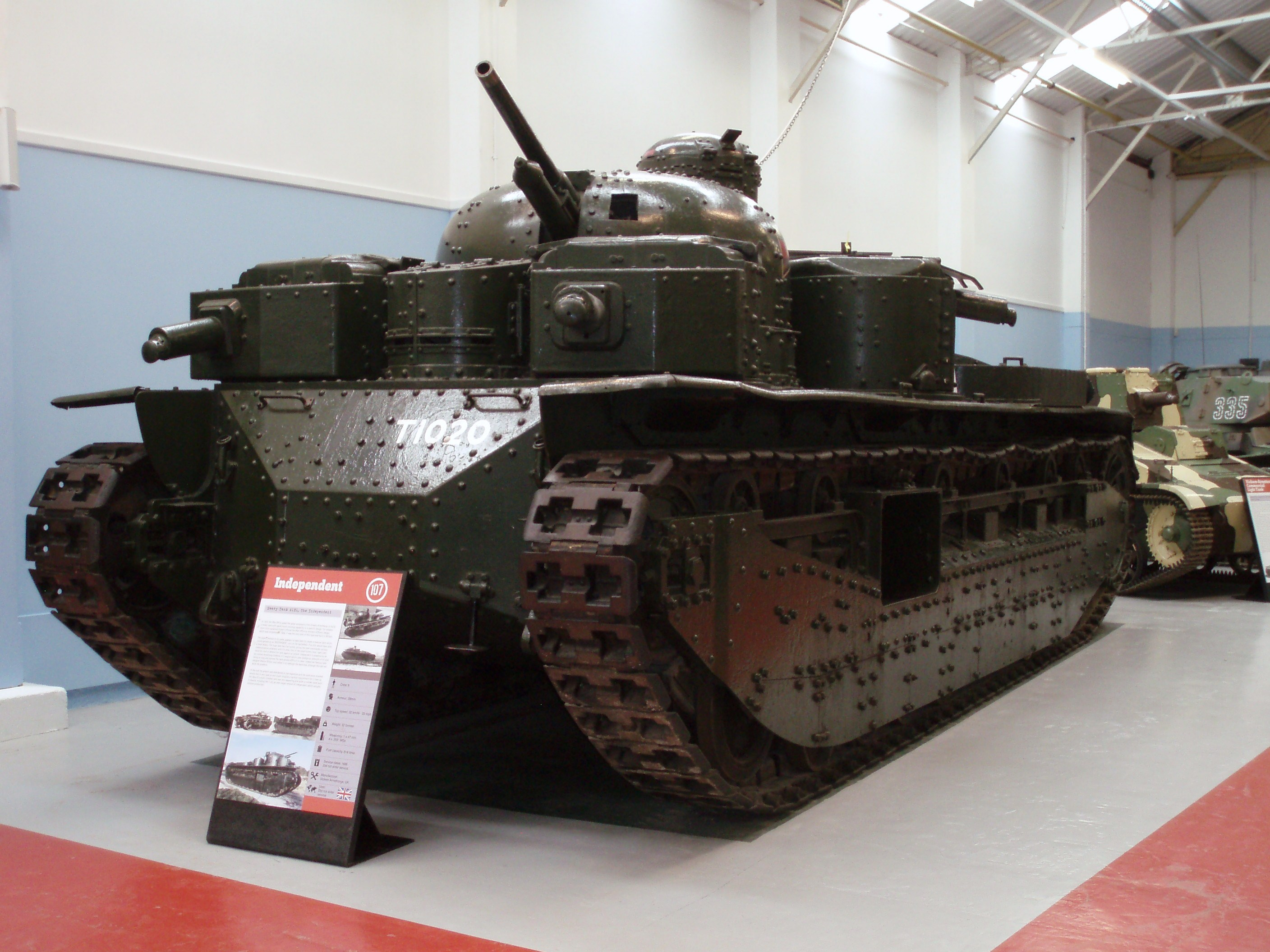 Bovington Tank Museum 228 Independent